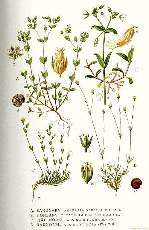 A. Arenaria serpyllifolia L. B. Cerastium fontanum Baumg. ssp. vulgare C. Minuartia biflora (L.) Schinz & Thell. D. Minuartia stricta (Sw.) Hiern Original Description A. Sandnarv, Arenaria serpyllifolia L. B. Hönsarv, Cerastium caespitosum Gil. C. Fjällnörel, Alsine biflora (L.) W G. D. Raknörel, Alsine stricta (Sw.) W G.